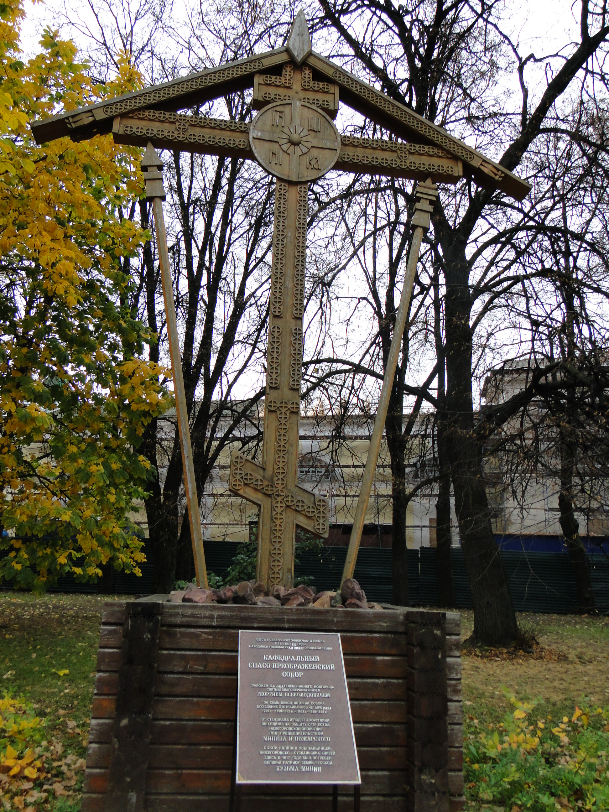 Крест на месте Кафедрального Спасо-Преображенского собора на территории Нижегородского кремля